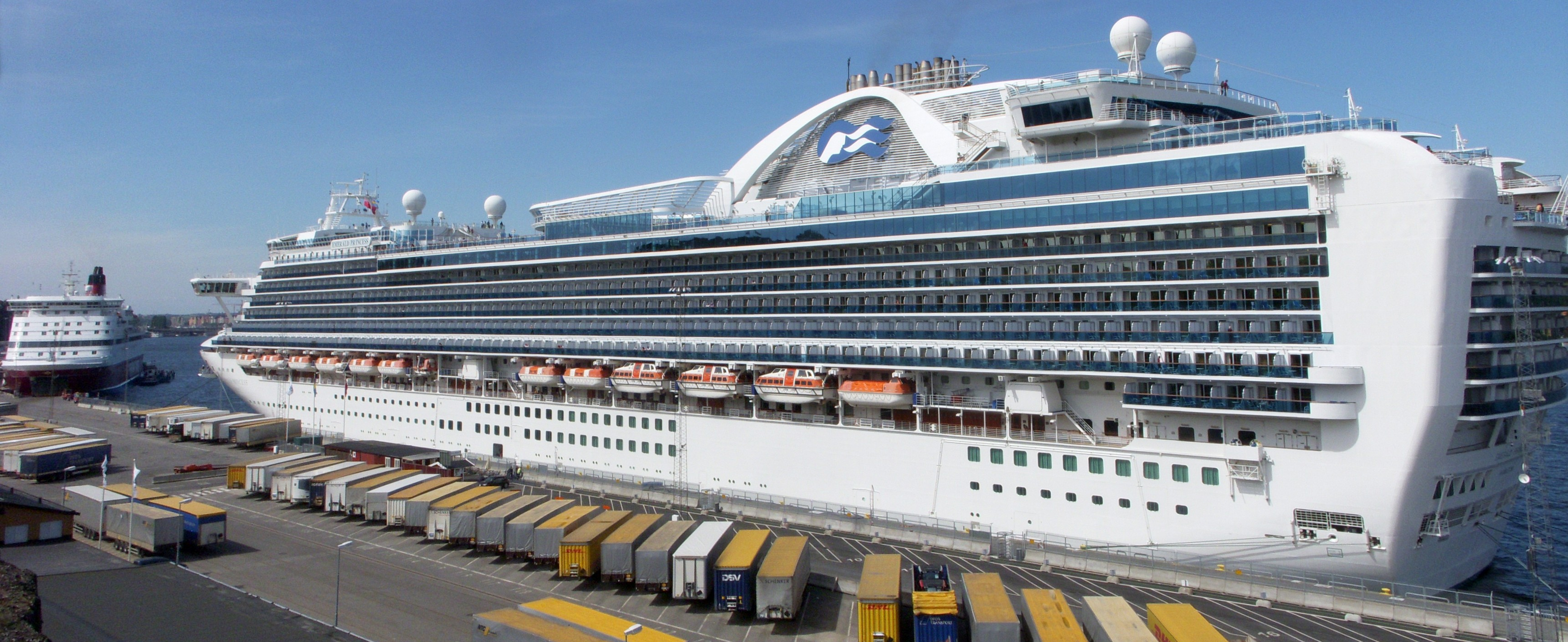 Kryssningsfartyget Emerald Princess i Masthamnen i Stockholm